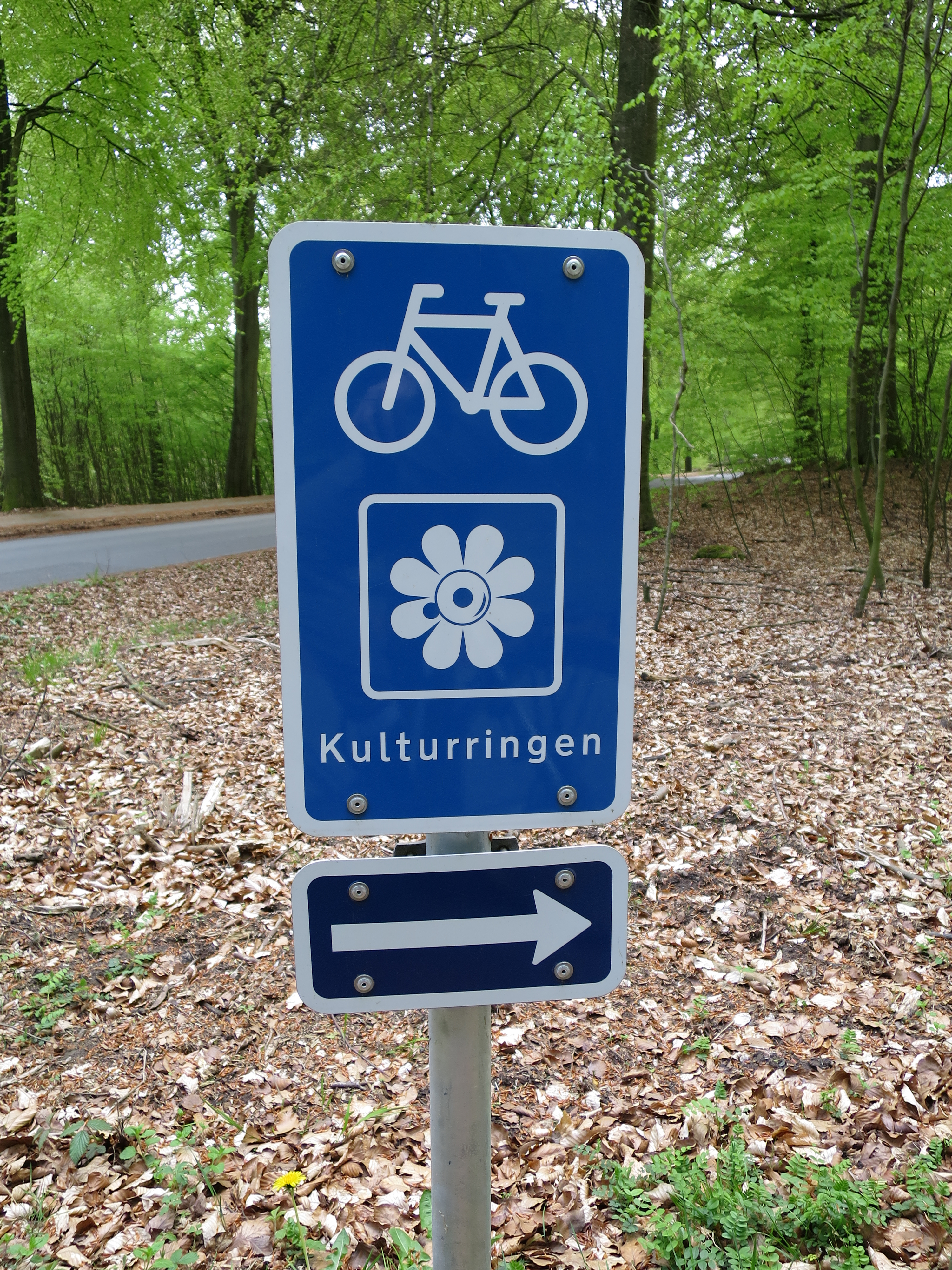 Skilt på Kulturringen, en cykelrute i Østjylland.